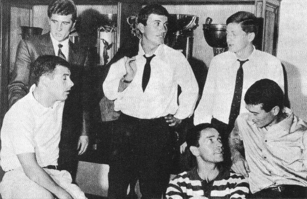 Torino (Italia), luglio 1963. I calciatori della Juventus F.C. si radunano nell'allora sede societaria del club, in piazza San Carlo, 206, in vista del ritiro precampionato. Da sinistra, in piedi: Benito Sarti, Gino Stacchini e Giovanni Sacco; seduti: i nuovi acquisti Carlo Dell'Omodarme, Dino da Costa e Adolfo Gori.